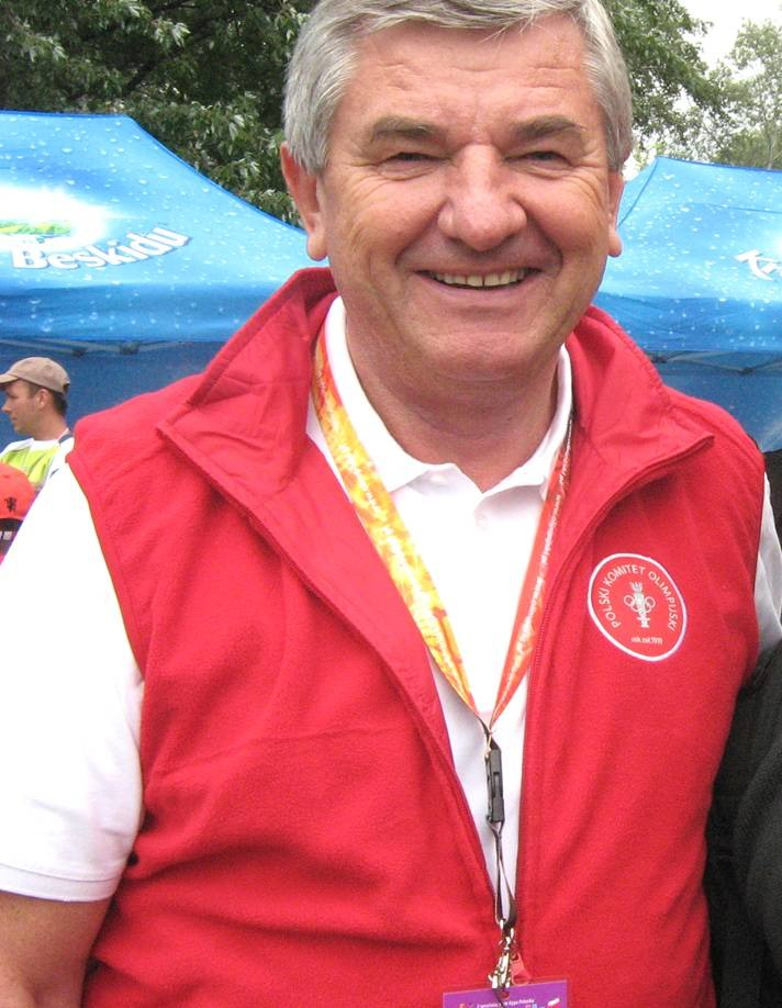 Piotr Nurowski (ur. 1945 w Sandomierzu) - polski działacz sportowy i społeczny, biznesmen.